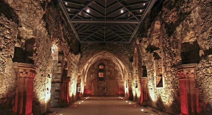 castle strunzens